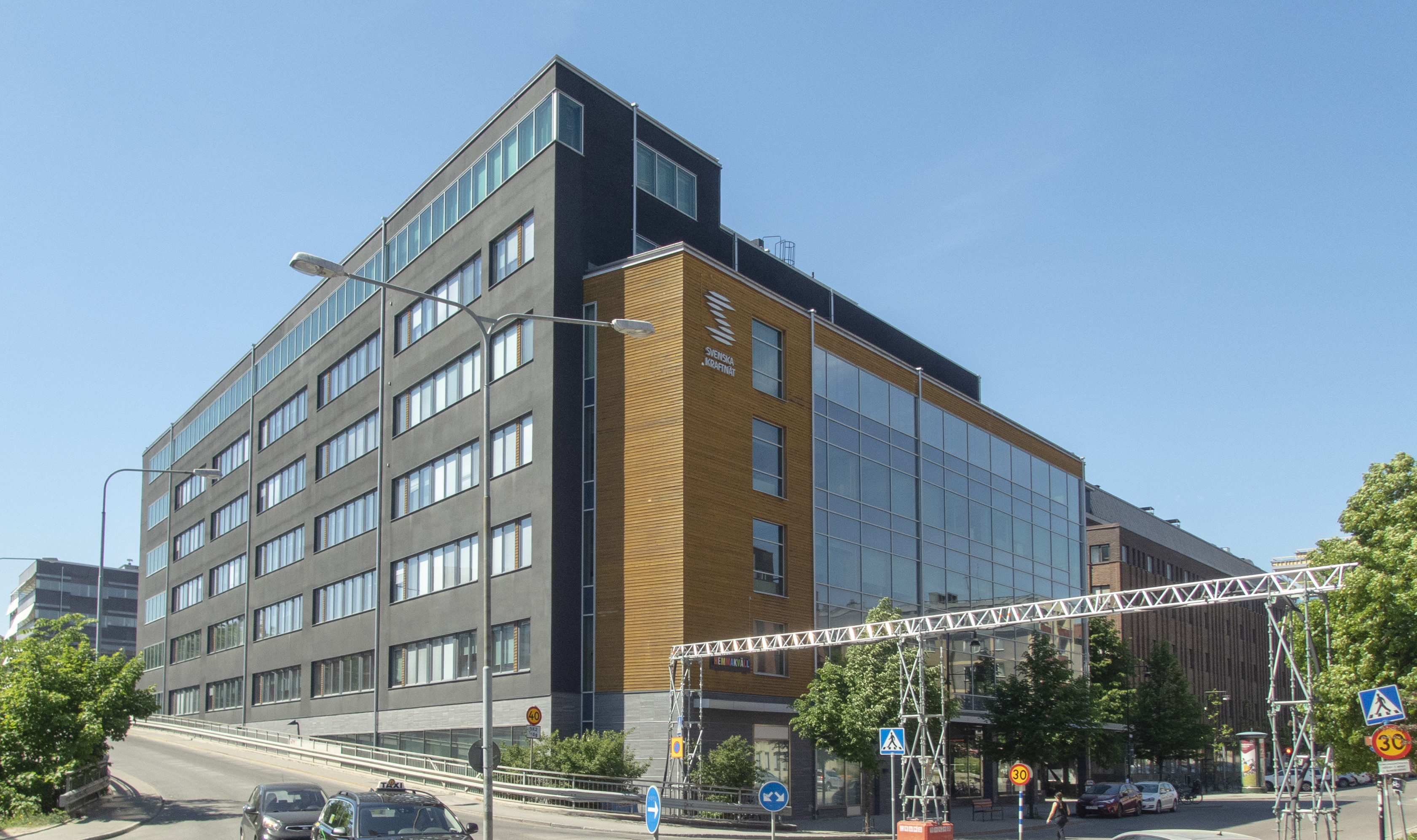 Svenska kraftnäts huvudkontor ”Black building”, kv.Magasinet 1, Sturegatan 1 Sundbyberg. Byggnadsår 2007-2009.